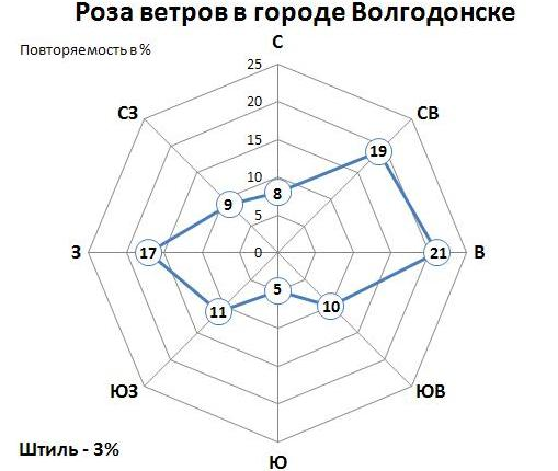 Роза ветров в городе Волгодонске